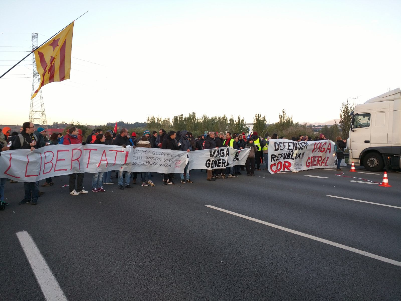 tall de carreteres durant vaga general novembre 2017